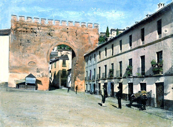 Rafael Garzón. Granada, Arco de Elvira. Postal coloreada, finales del siglo XIX, principios del XX.